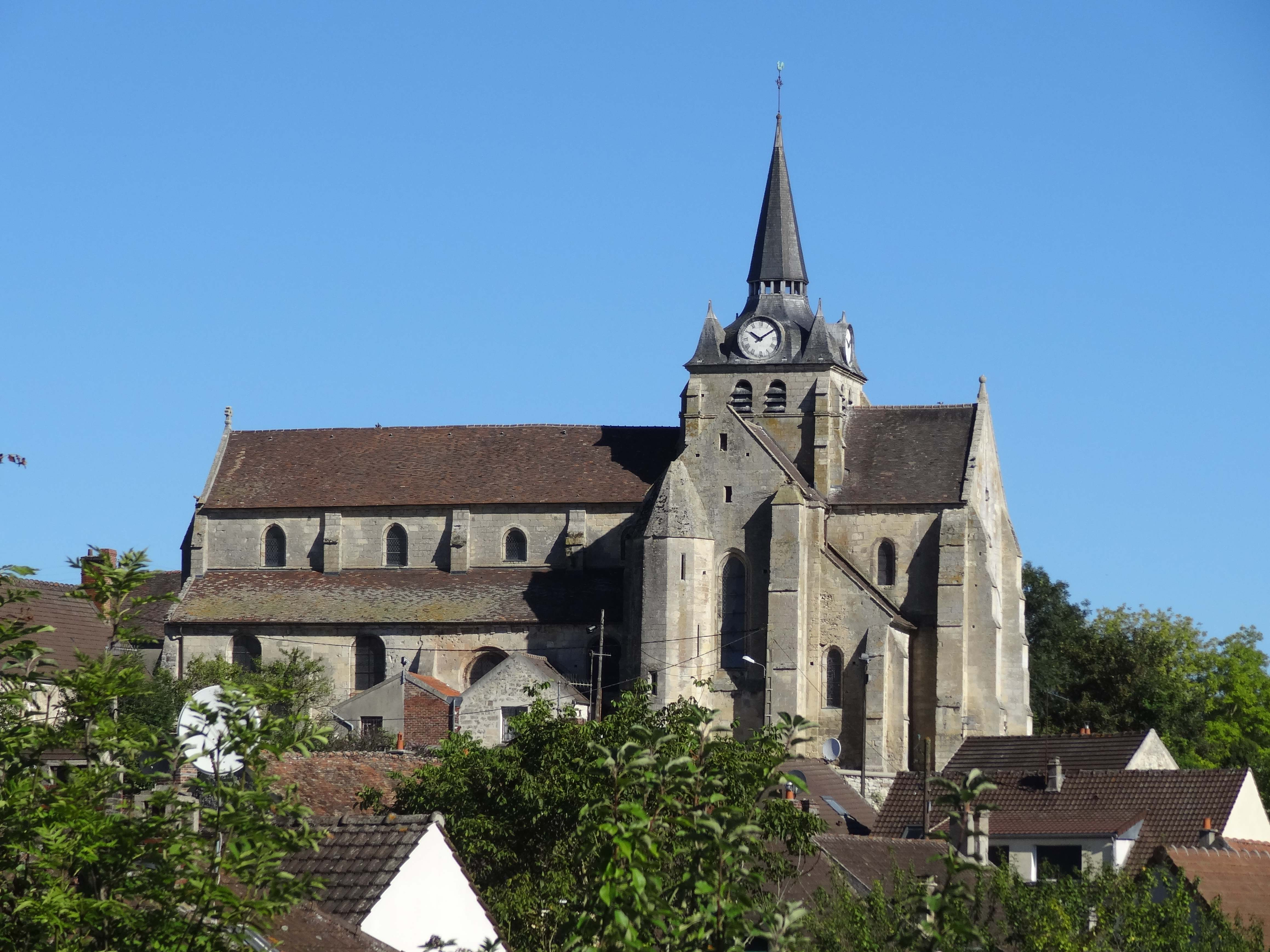 Église Saint-Martin de Mareuil-sur-Ourcq - voir titre.